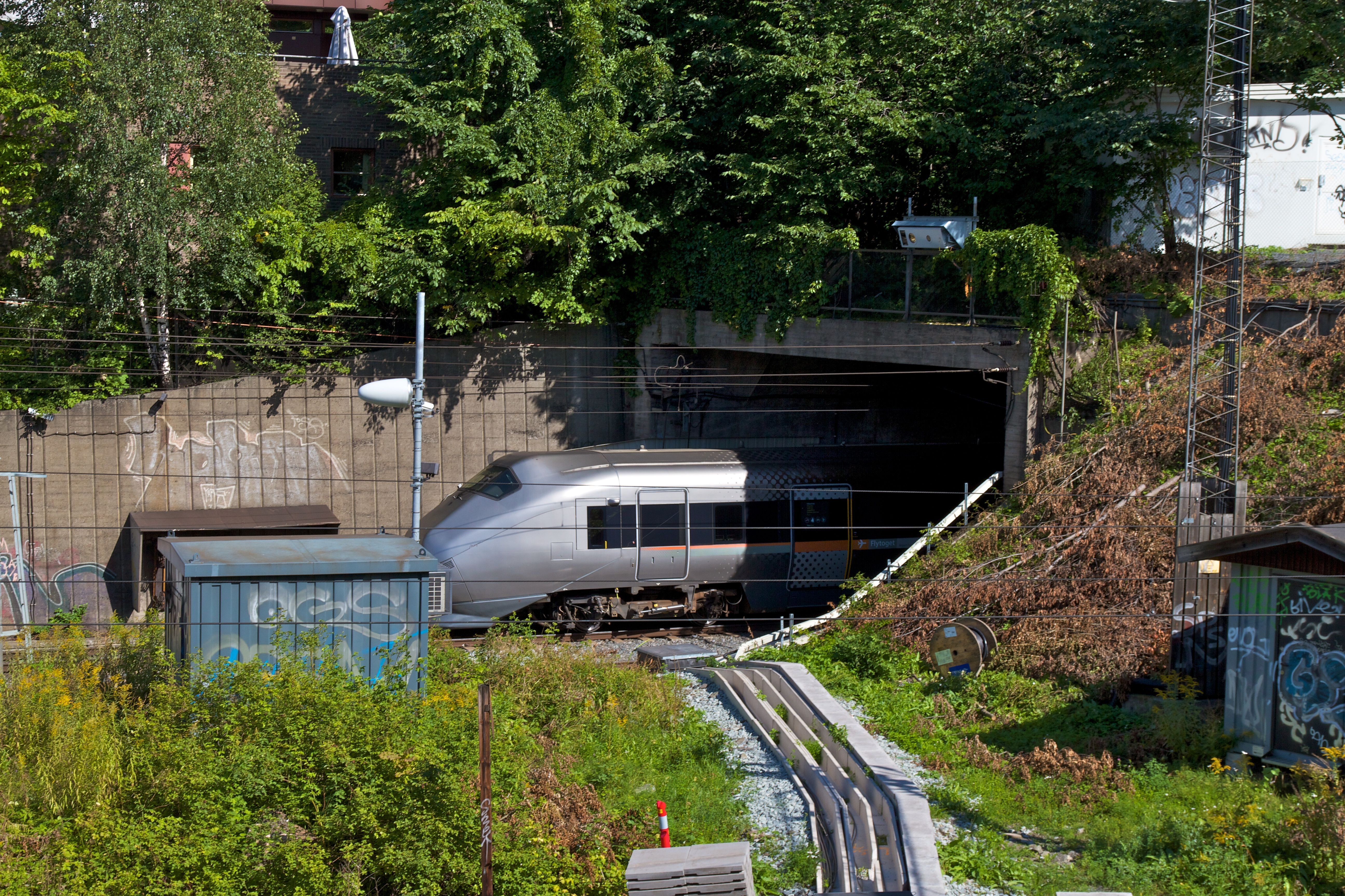 Flytoget på vei ut av Oslotunnelen.